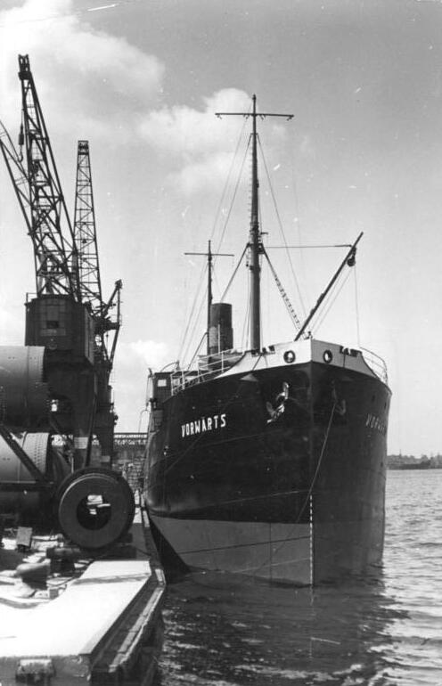 Zentralbild / Pietsch / 23.9.53 / Str.-Ho. / Im Hafen von Rostock. Ein Zeichen für den sich ständig erweiternden Außenhandel der Deutschen Demokratischen Republik ist die große Zahl der Schiffe, die im Hafen von Rostock mit wertvollem Material be- und entladen werden. UBz: Das erste deutsche Frachtschiff "Vorwärts"